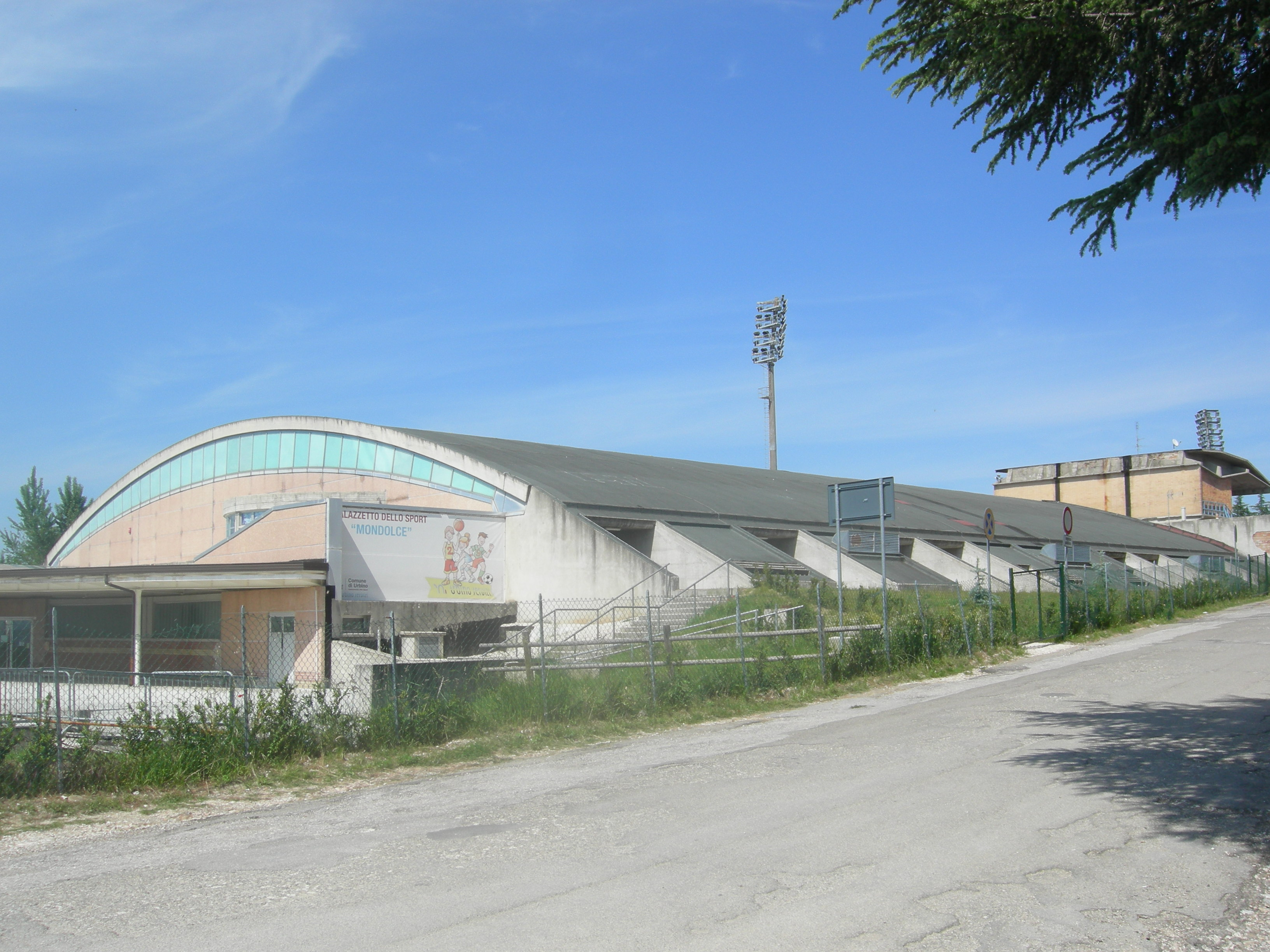 Il Palazzetto dello Sport Mondolce di Urbino.